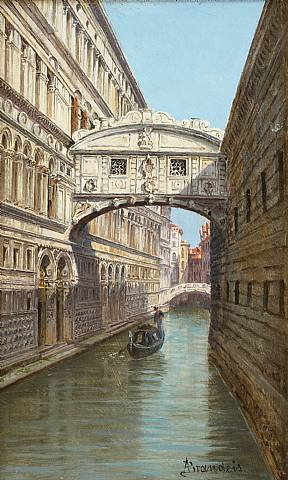 Luxembourgish: Seufzerbréck zu Venedeg